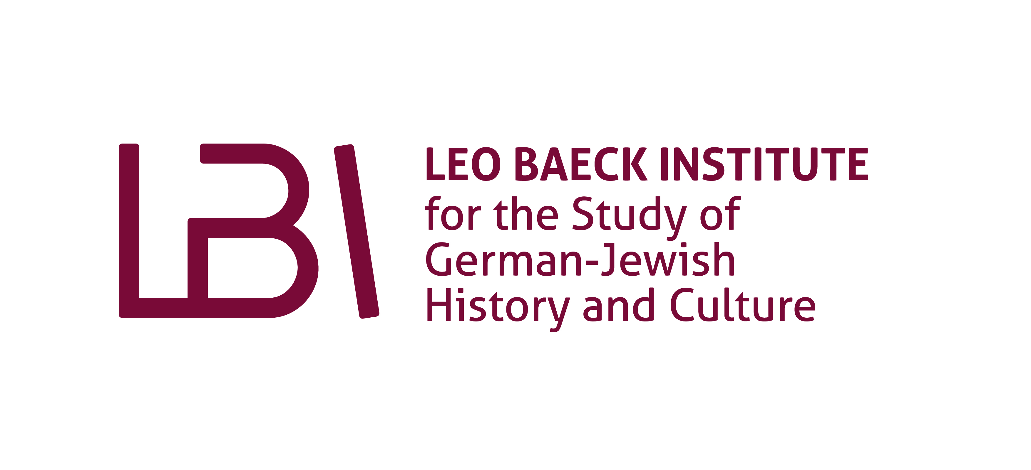 Das Logo ist die Corporate Identity (CI) des Leo Baeck Instituts International